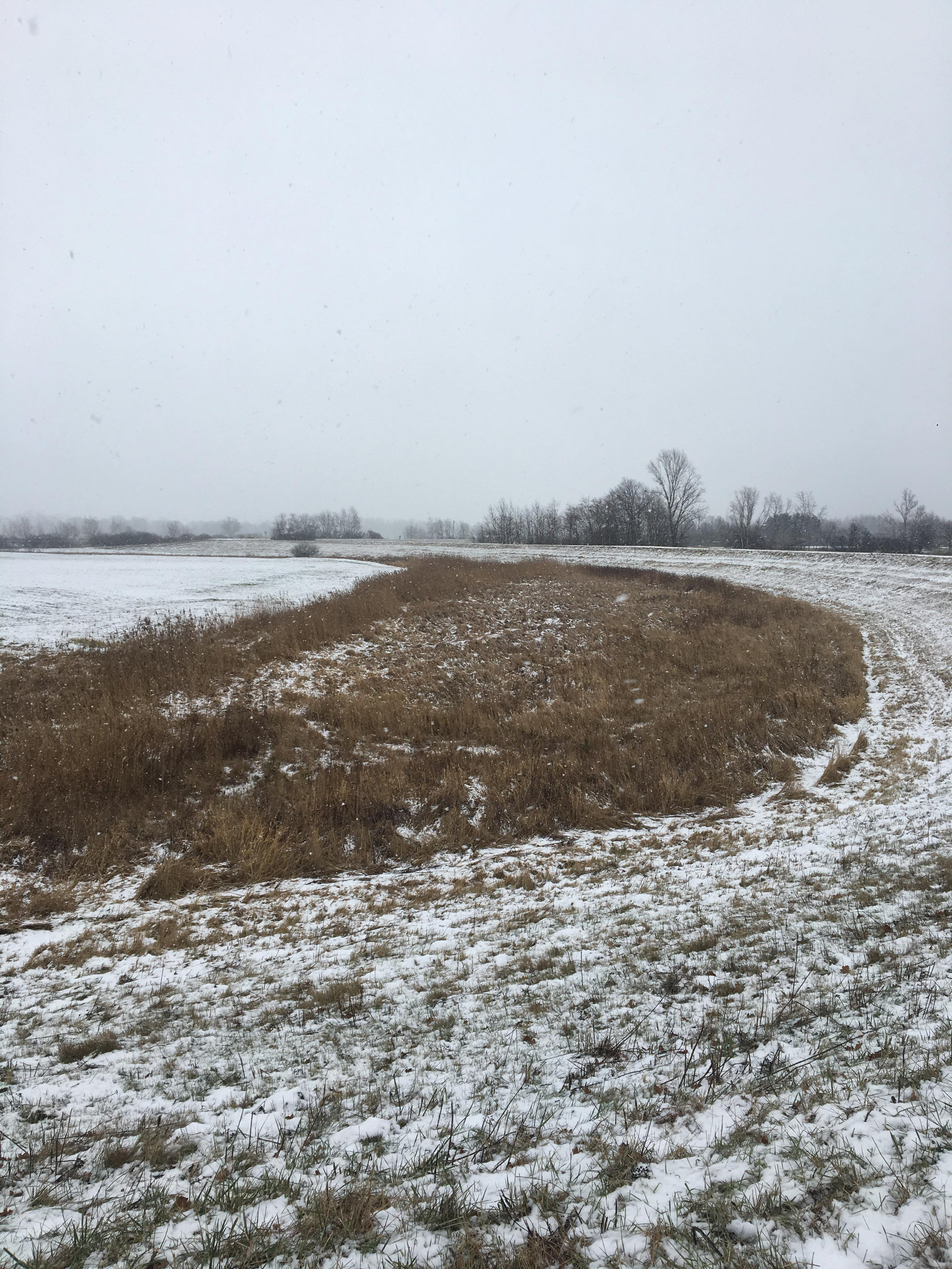 Widoczny sierpowaty kształt na dalszym planie fotografii. Paleomeander w tym miejscu ma około 1700 metrów długości i średnio około 10 metrów szerokości.